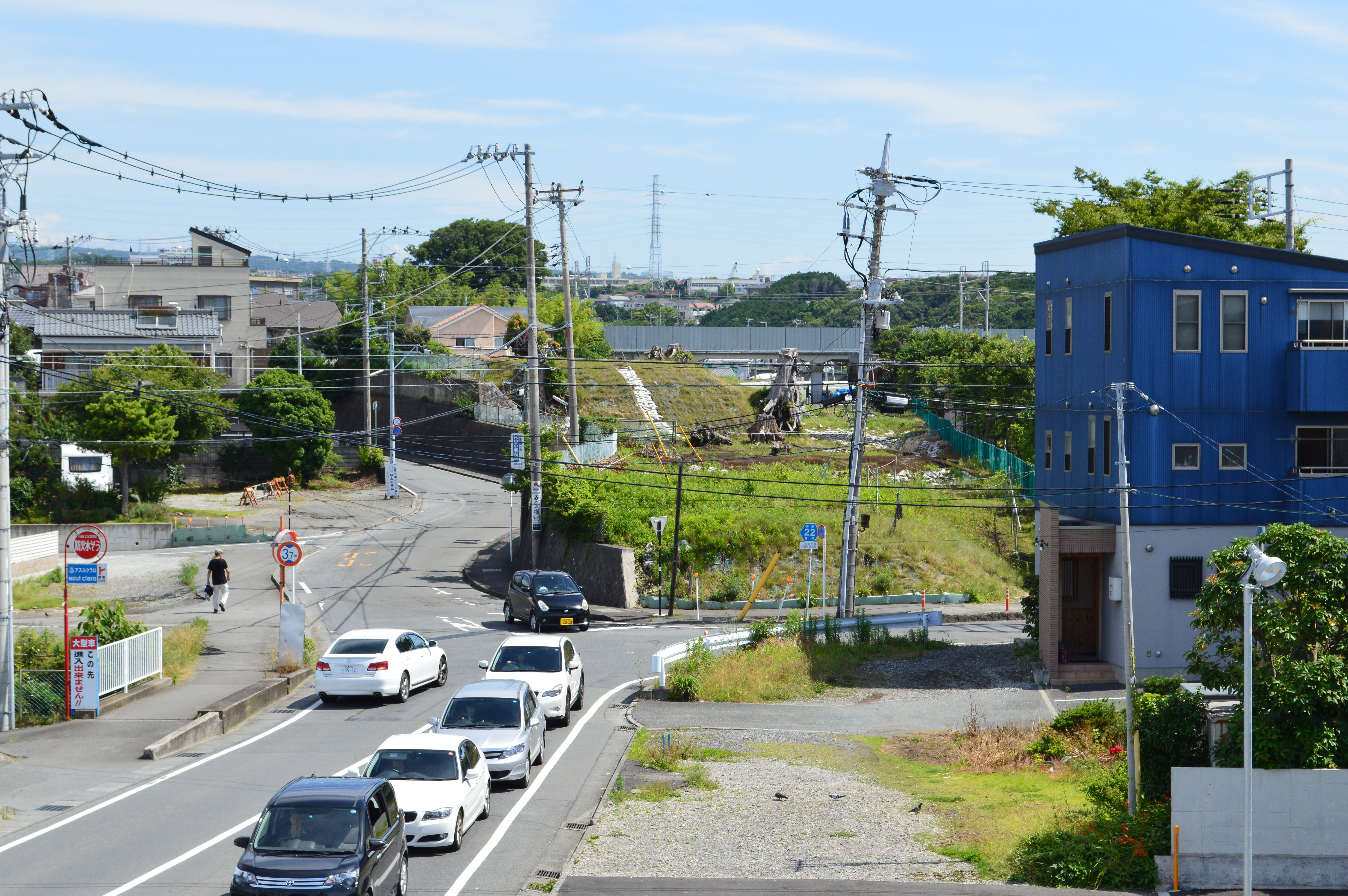 高尾山古墳 (沼津市) 遠景